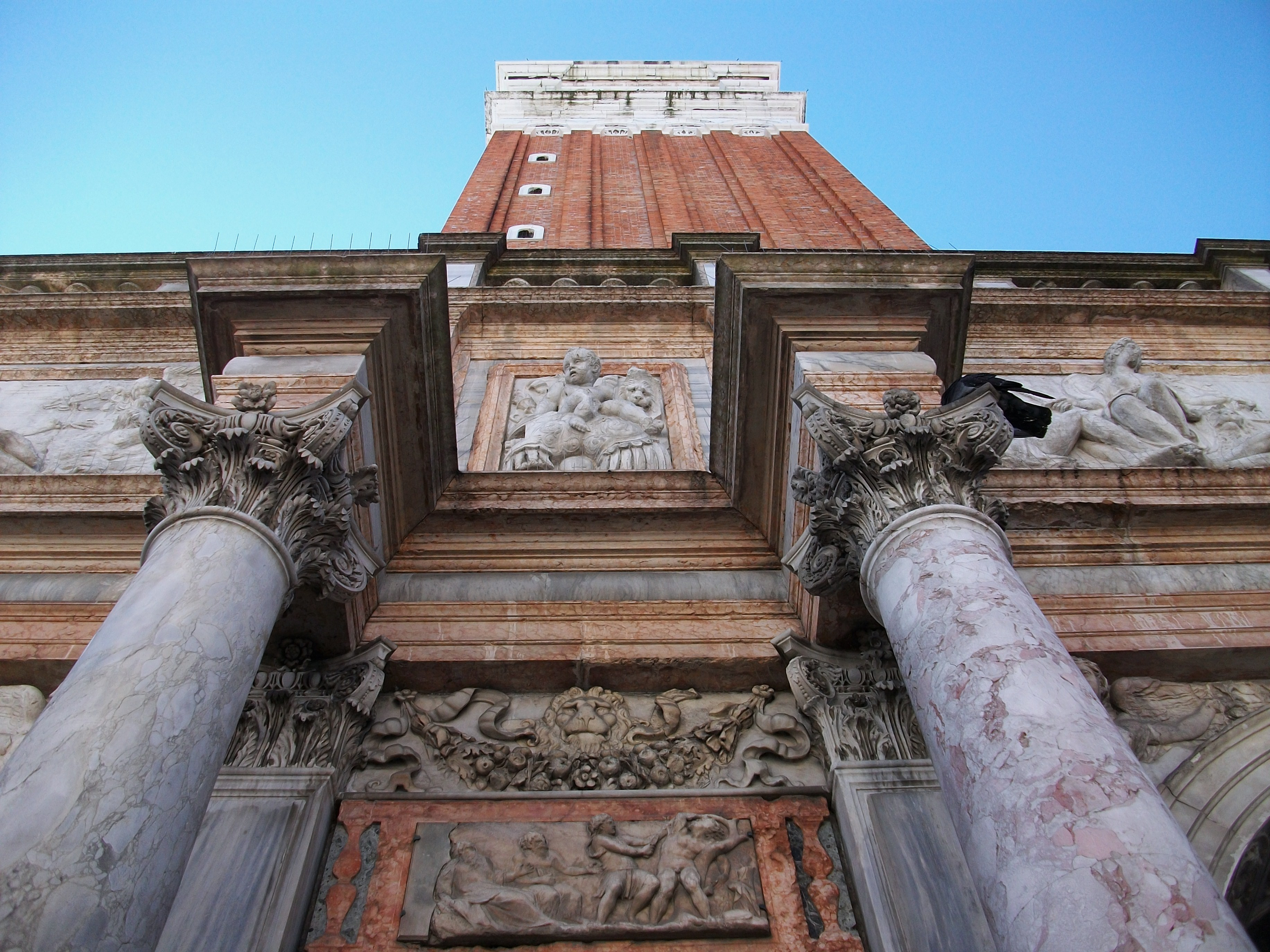 Llotgeta del Sansovino i campanile, Venècia.